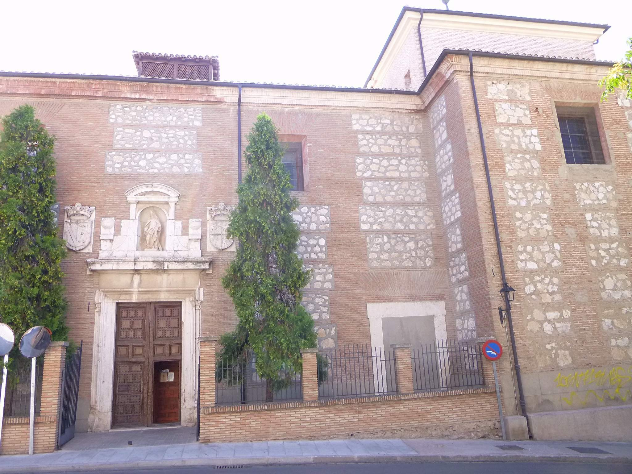 Convento de la Encarnación (Clarisas), en Valdemoro (Madrid))